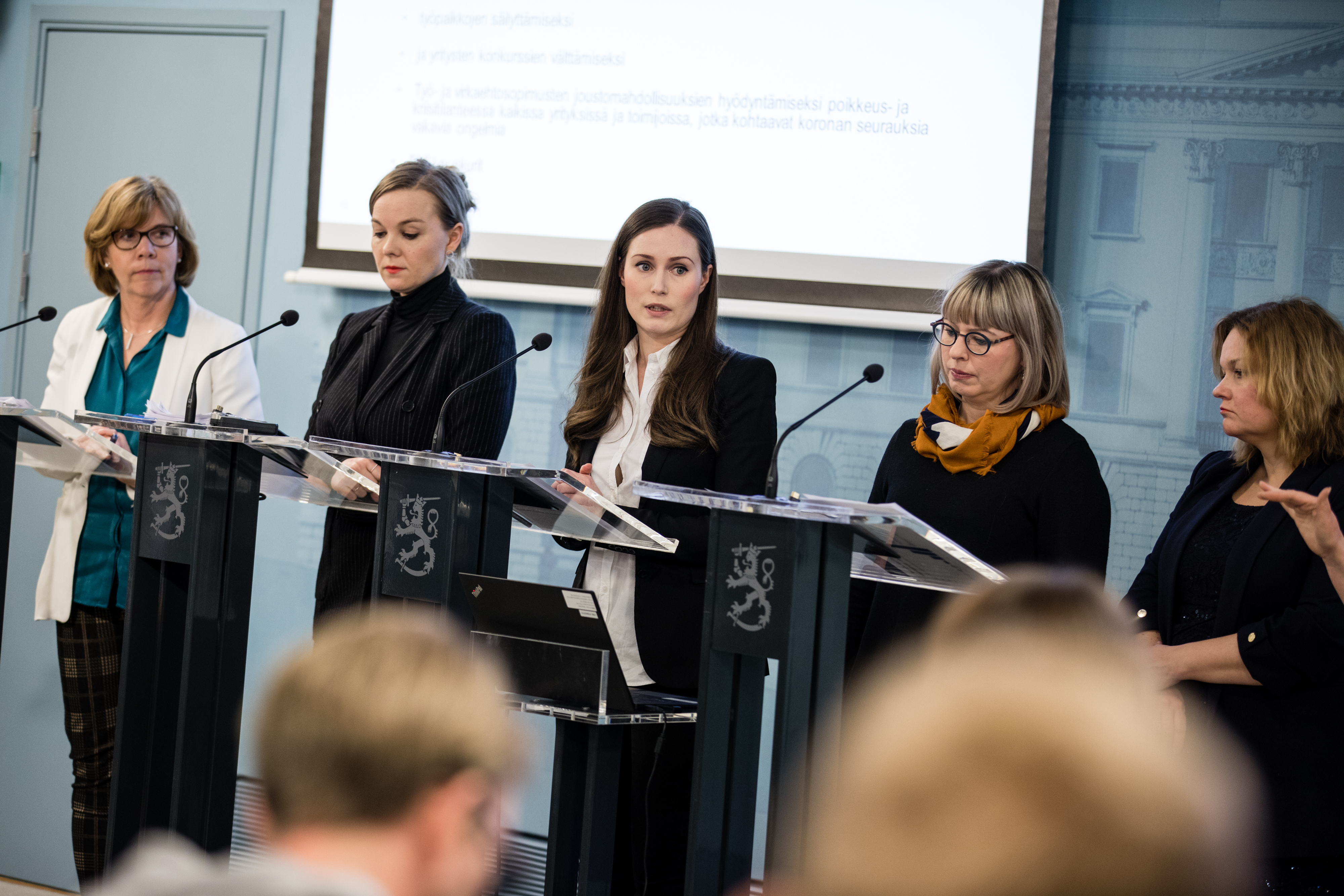 © Laura Kotila | valtioneuvoston kanslia